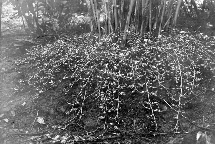 Repronegatief. Goed dragende 2-jarige cardamomplant (Elettaria cardamomum) in vruchtdracht